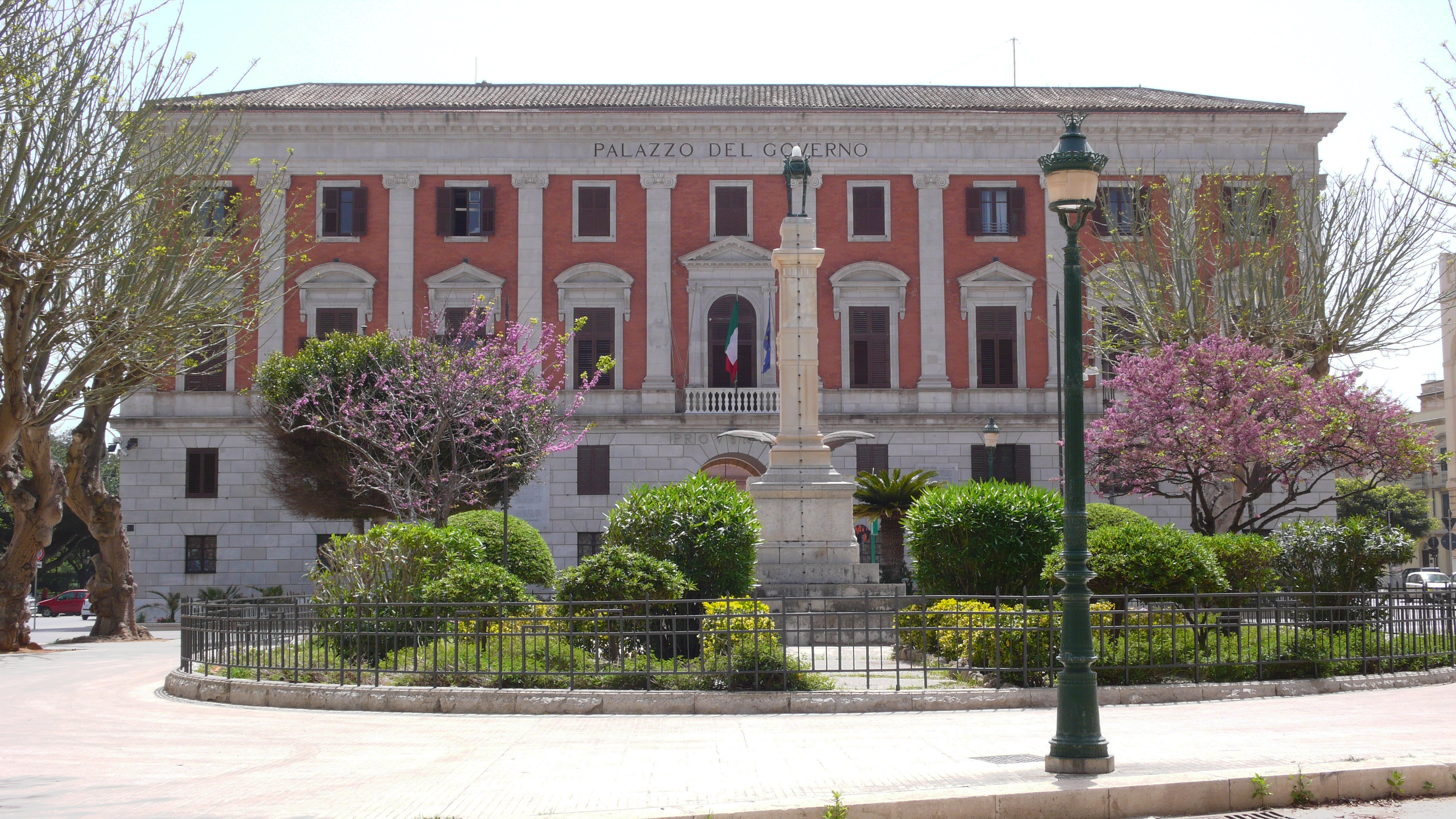 Palazzo del Governo, sede di Prefettura e Provincia, Trapani